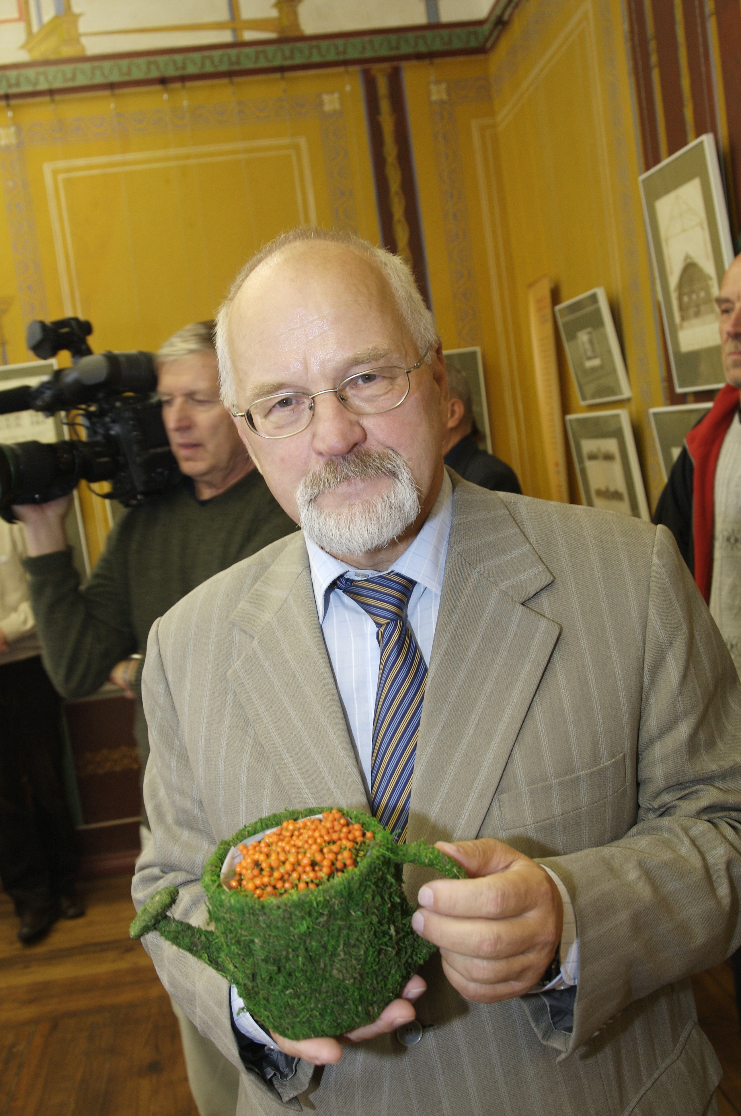 19. septembril 2007 esitleti TÜ kunstimuuseumis Tartu Ülikooli 375. aastapäevale pühendatud huumorikogumikke – Peeter Tulviste koostatud „200 ülikoolinalja” ja Vello Lääne ning Hillar Palametsa kokku pandud „Tõestisündinud lood ja anekdoodid 6 samba tagant”. Pildil professor Peeter Tulviste.